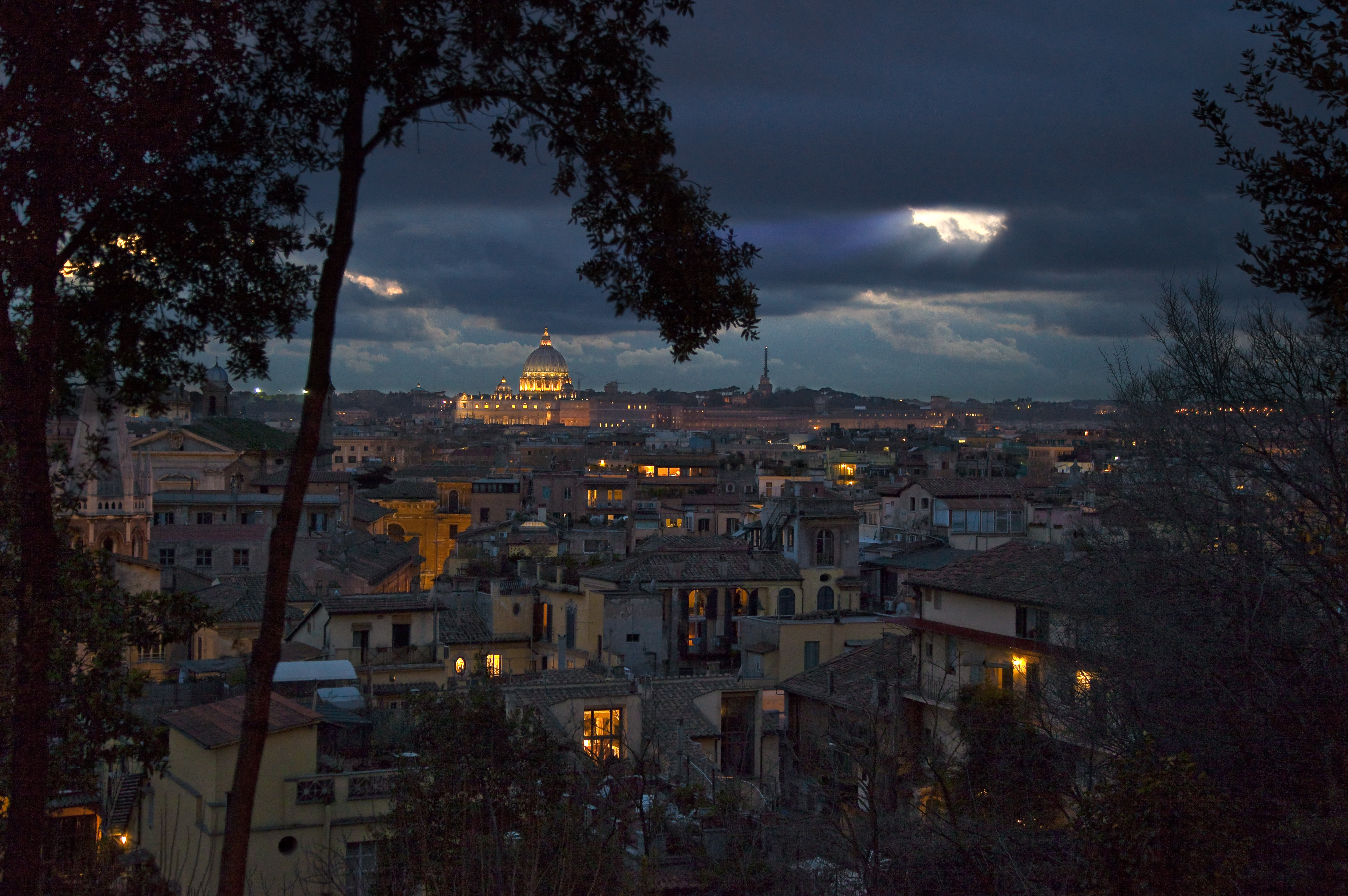 Blick vom colle Pinciano auf das nächtliche Rom in Richtung Petersdom; Standpunkt ist von der Pincio-Terasse ein kleines Stück in Richtung Spanischer Treppe.